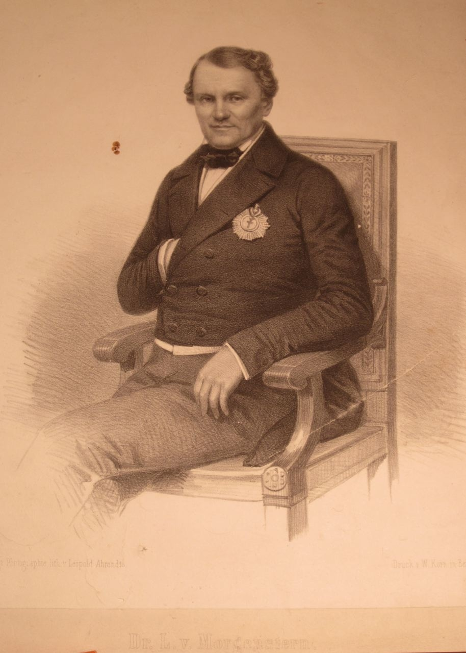 zeitgenössisches Portrait Dr. Leopold von Morgenstern (1790-1864)